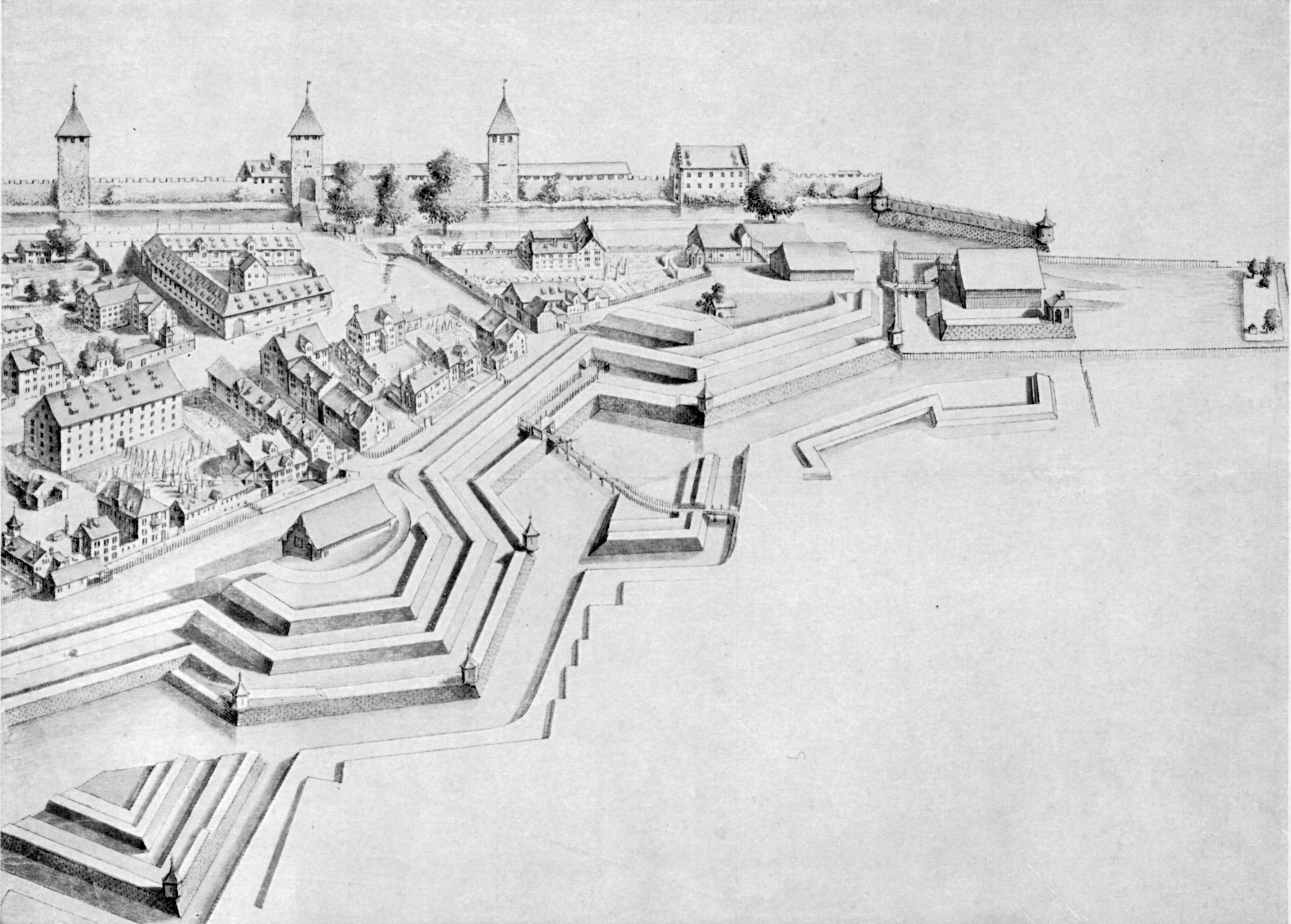 Das Schanzensystem in Zürich um den heutigen Paradeplatz im 18. Jahrhundert. Tuschezeichnung aus unbekannter Hand von anfangs 18. Jahrhundert. Original in der Zentralbibliothek Zürich.